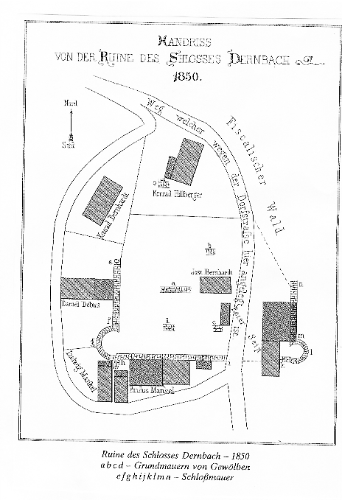 Grundriss der Burganlage Dernbach von 1850